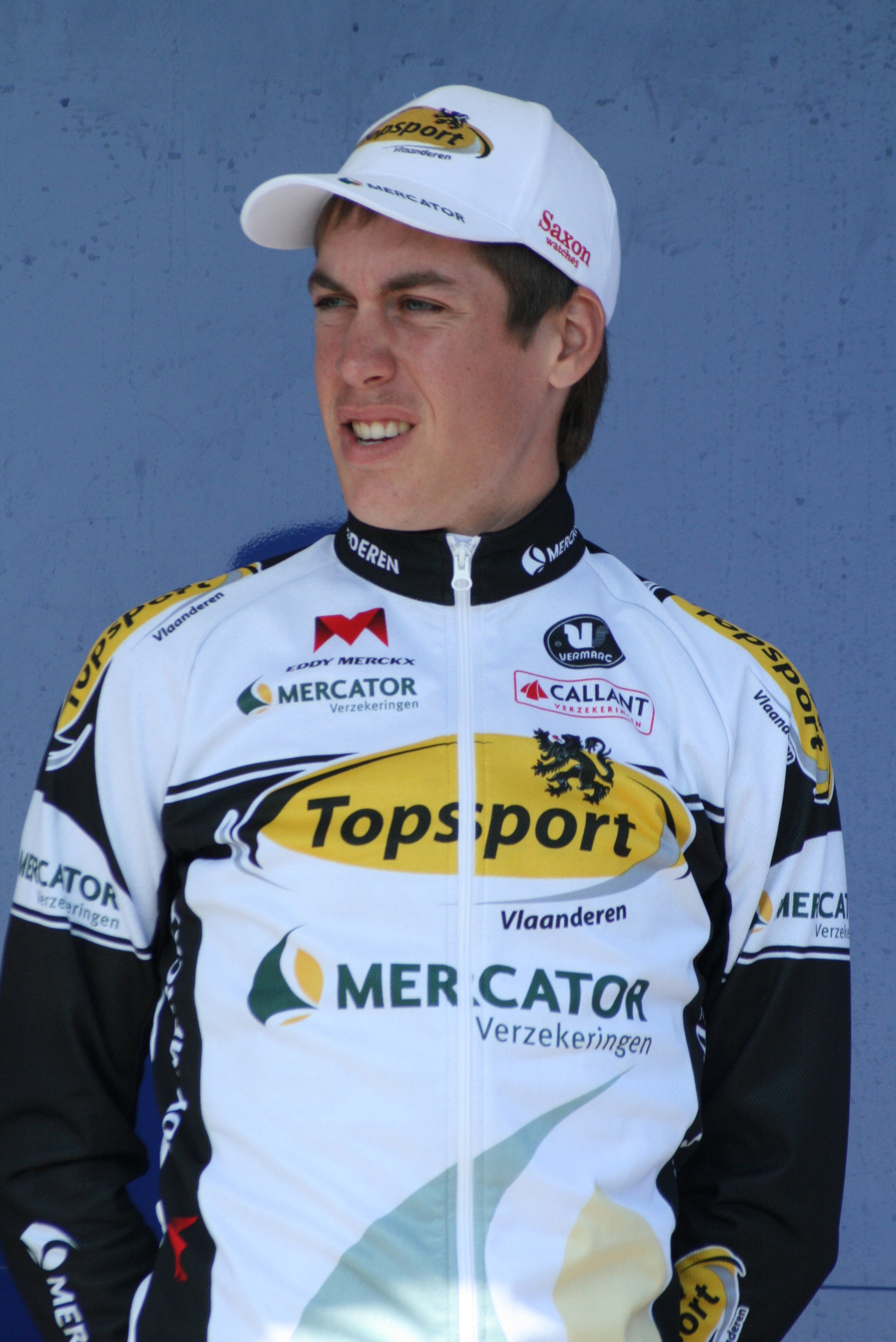 Présentation des coureurs au départ de la première étape Jelle Wallays